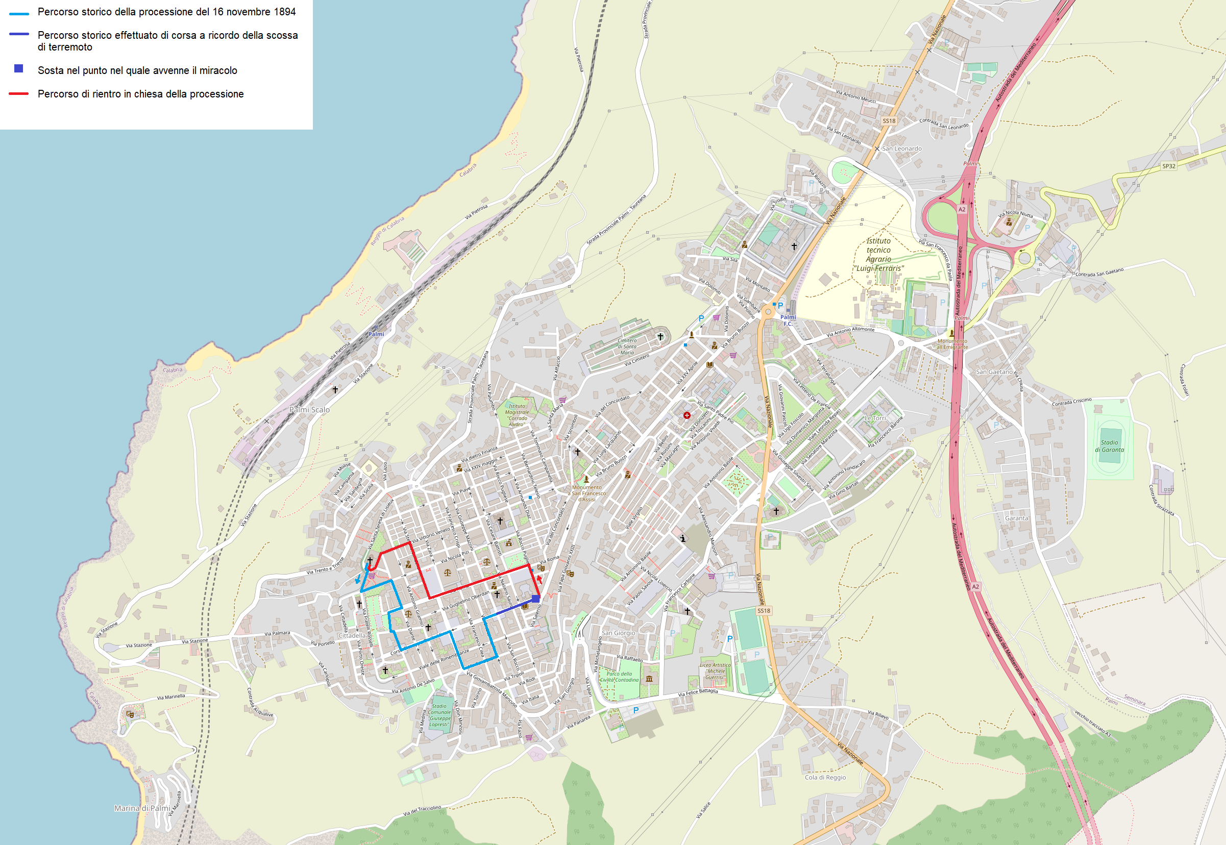 Percorso storico della processione di Maria Santissima del Carmelo per le vie di Palmi, la sera di ogni 16 novembre.